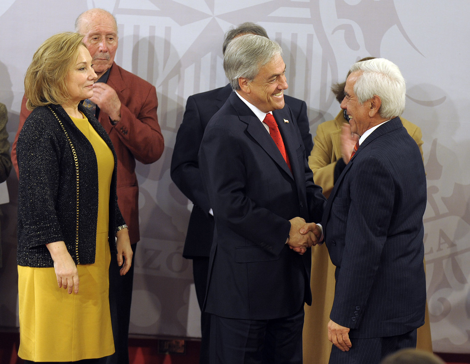 El Presidente Sebastián Piñera y su esposa Cecilia Morel entregan pensiones de gracia a destacados folcloristas chilenos. En la Foto Jorge Yáñez.